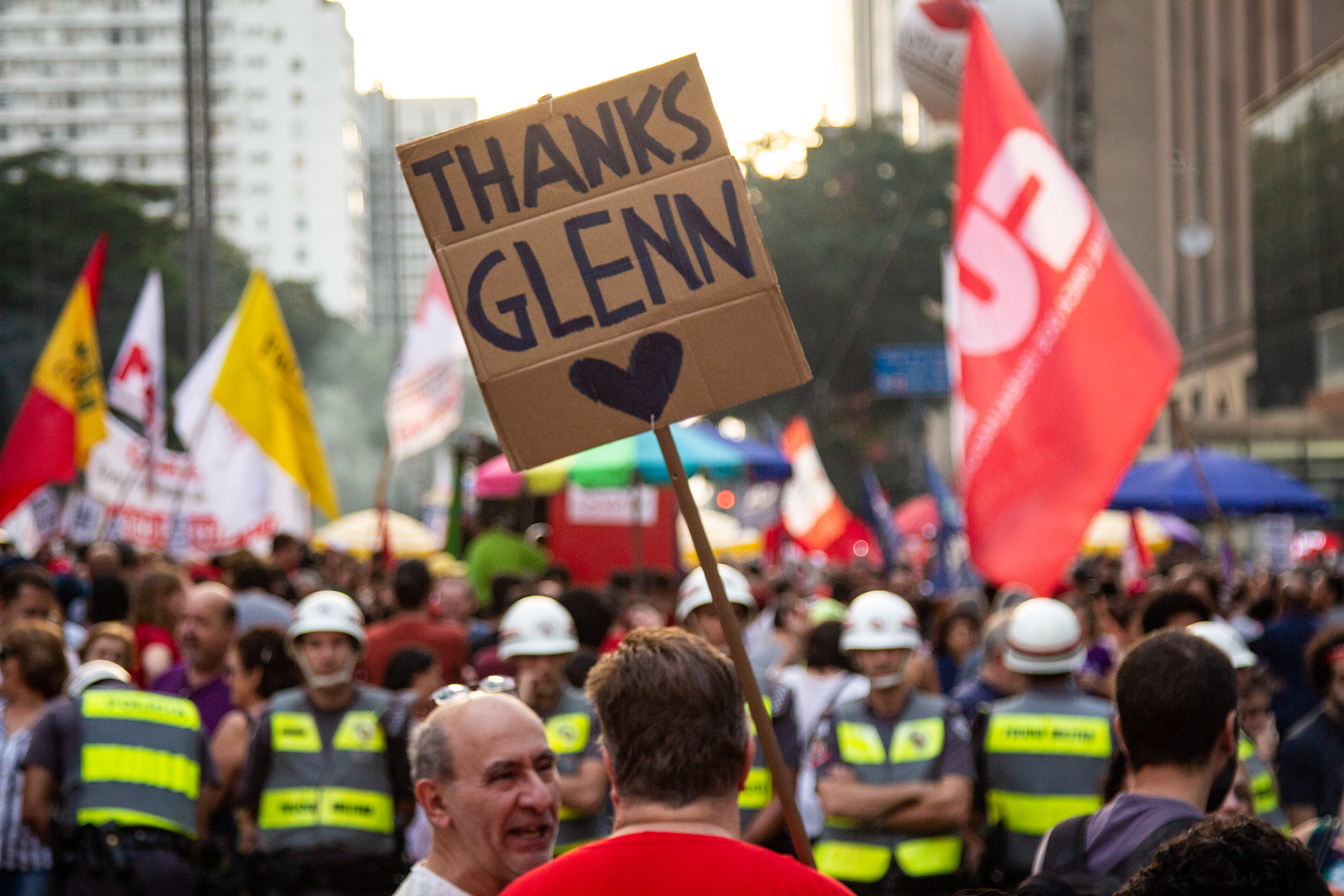 Protesto contra Jair Bolsonaro